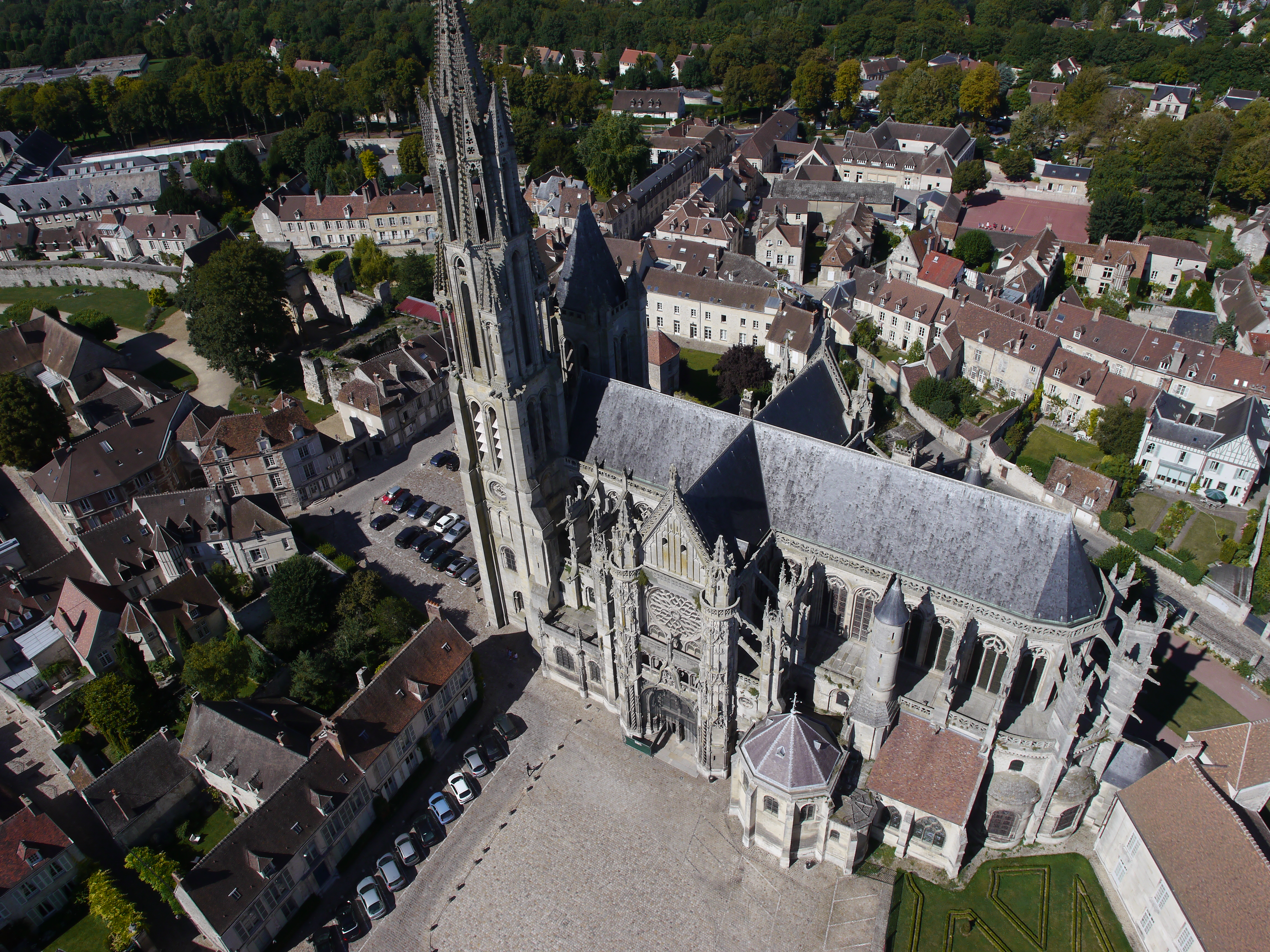 Cathédrale Notre-Dame de Senlis, vue aérienne 1